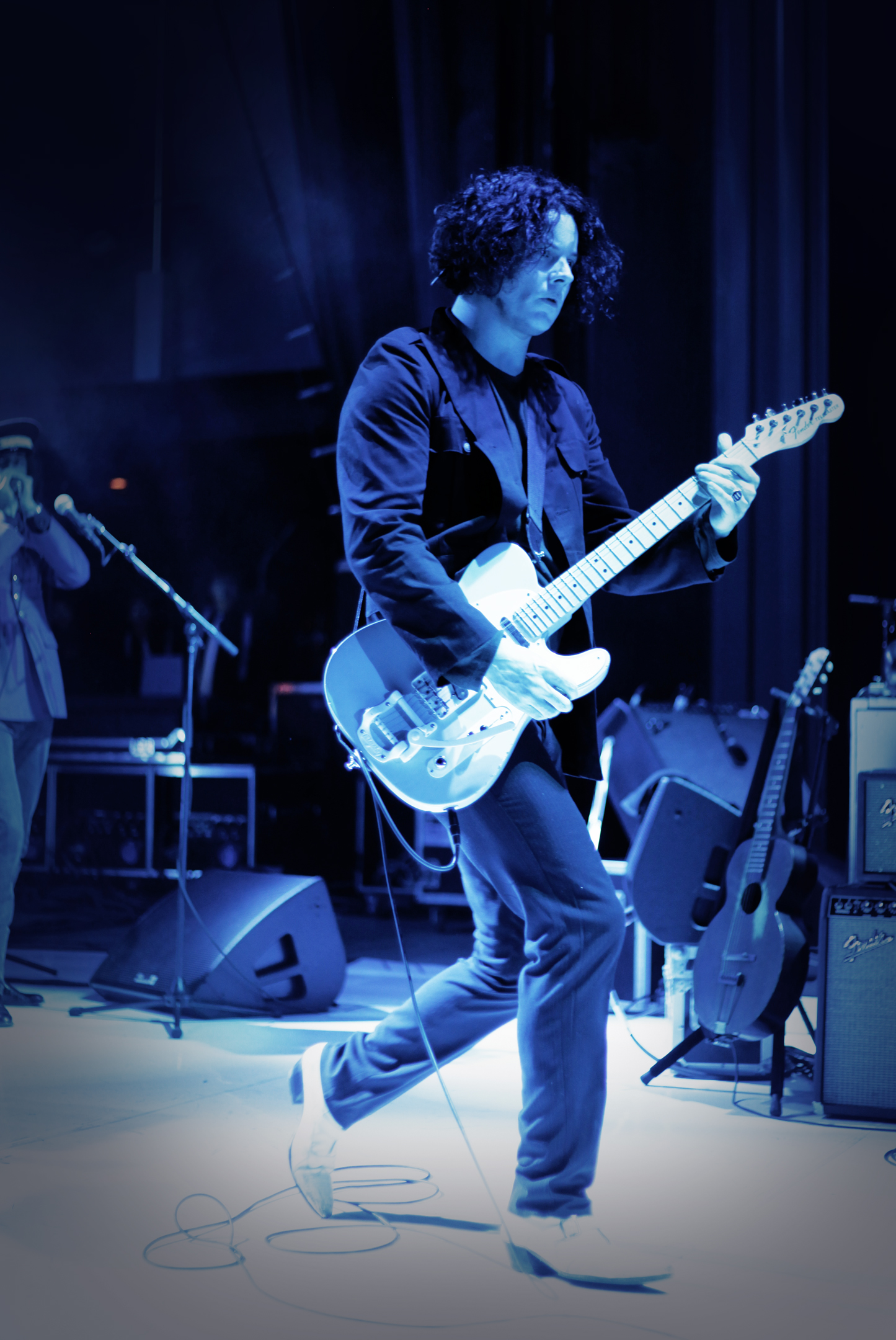 Jack en un recital de Columbus, 2012